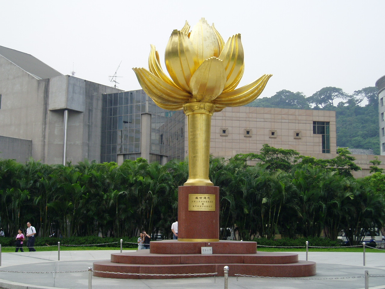 中文（香港）: 金蓮花廣場